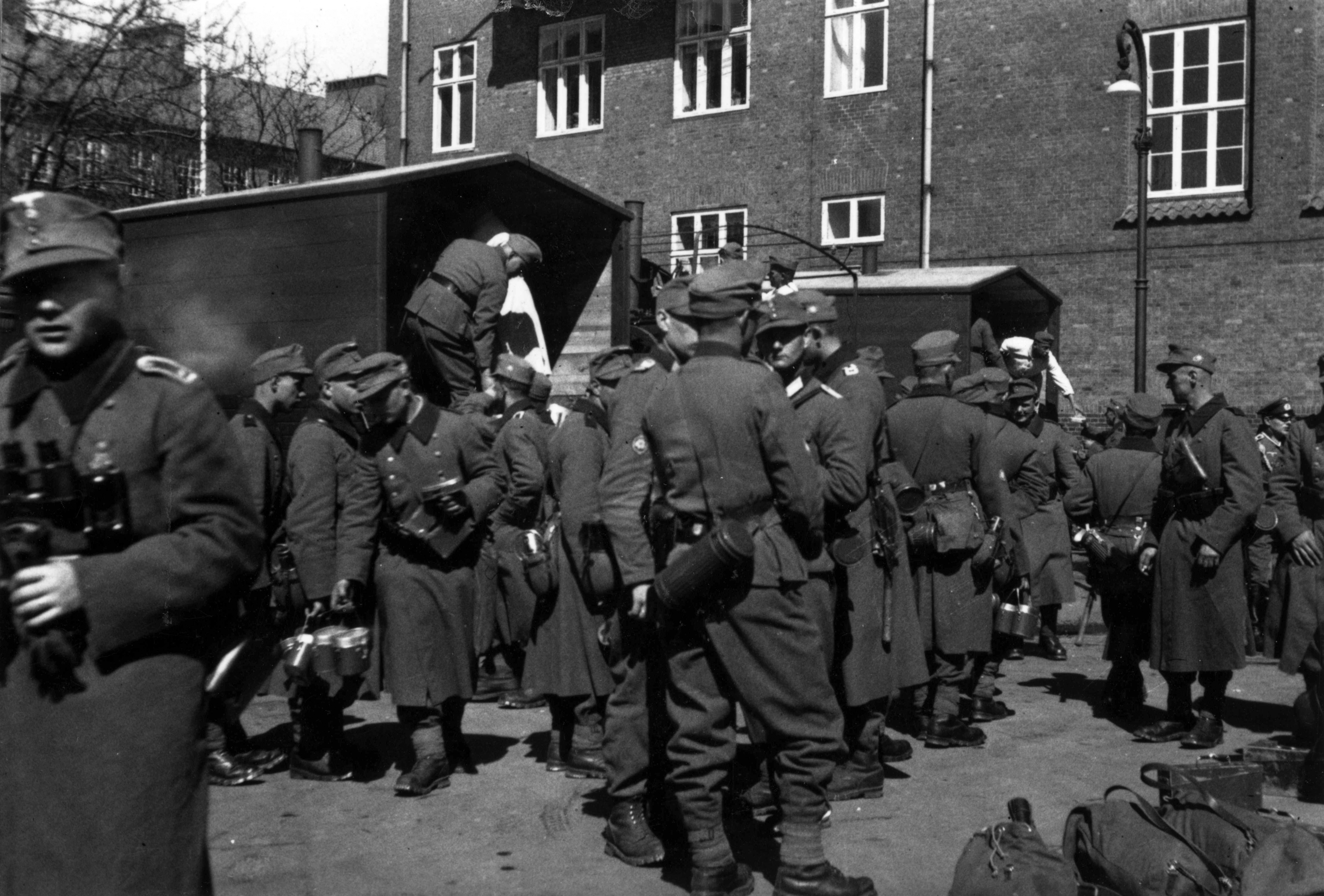 Bergjegere i Danmark, København Tittel / Title: Bergjegere i Danmark Dato / Date: 02.05.1940 Fotograf / Photographer: Rudi Margreiter Sted / Place: København, Danmark Eier / Owner Institution: Arkiv i Nordland Lenke / Link: Arkiv i Nordland Arkivreferanse /Archive reference: AIN.NA143.0217 Fra Dag Skogheims Privatarkiv Tekst bak på bildet: Aus meiner fotosammlung: 02.mai 1940 in kopenhagen, abfahrt zum flugfeld. In der mitte von rückwärts mit gasmaskenbüchse umgehängt unser chef 7.kp.oblt. Wörte, spricht mit leutnant Gressel! 7. kompani 2. bataljon av Bergjegerreg. 137